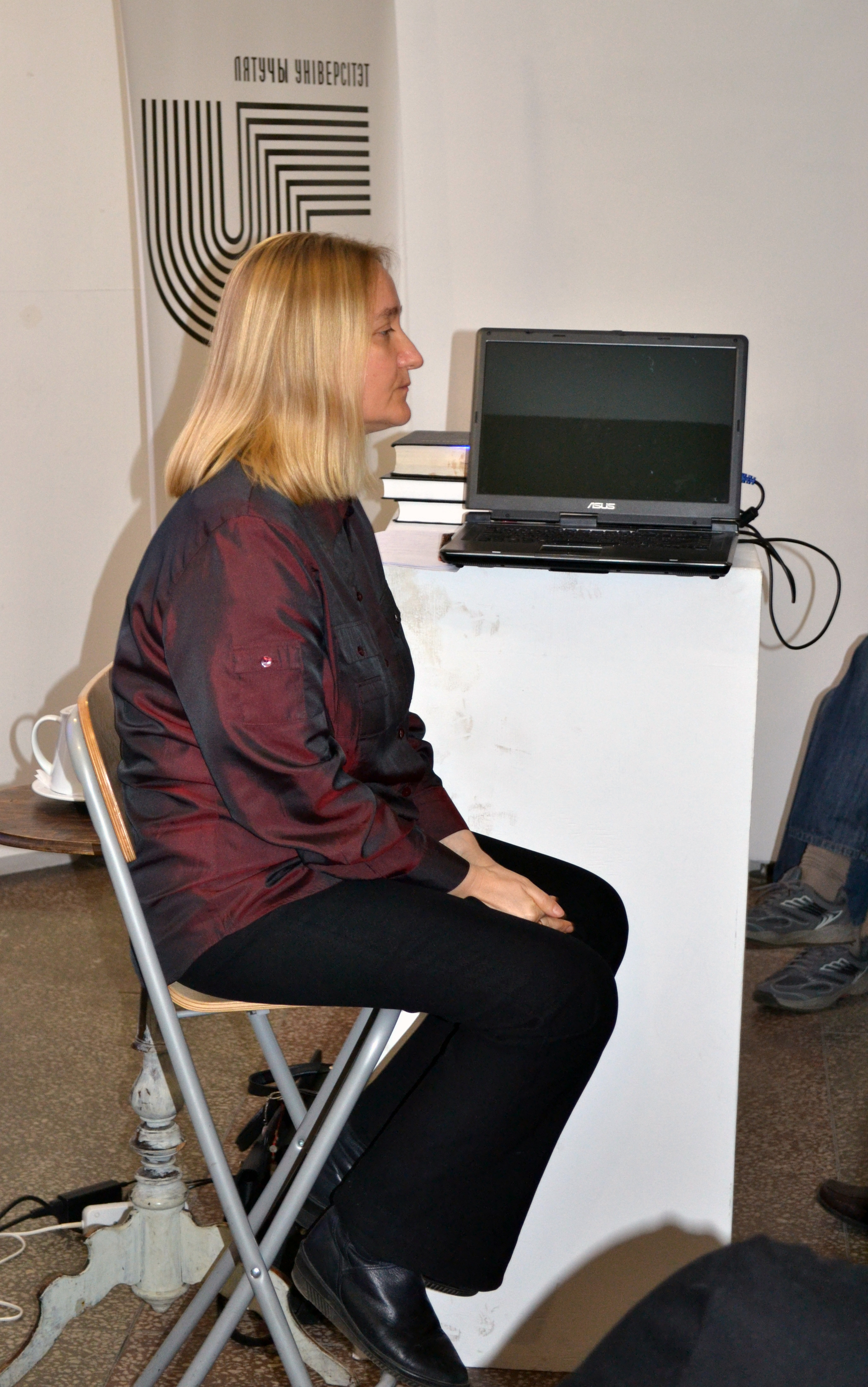 Беларуская (тарашкевіца): Ірына Дубянецкая падчас лекцыі «Беларусь 1000 гадоў бяз Бібліі». Галерэя «Ў».